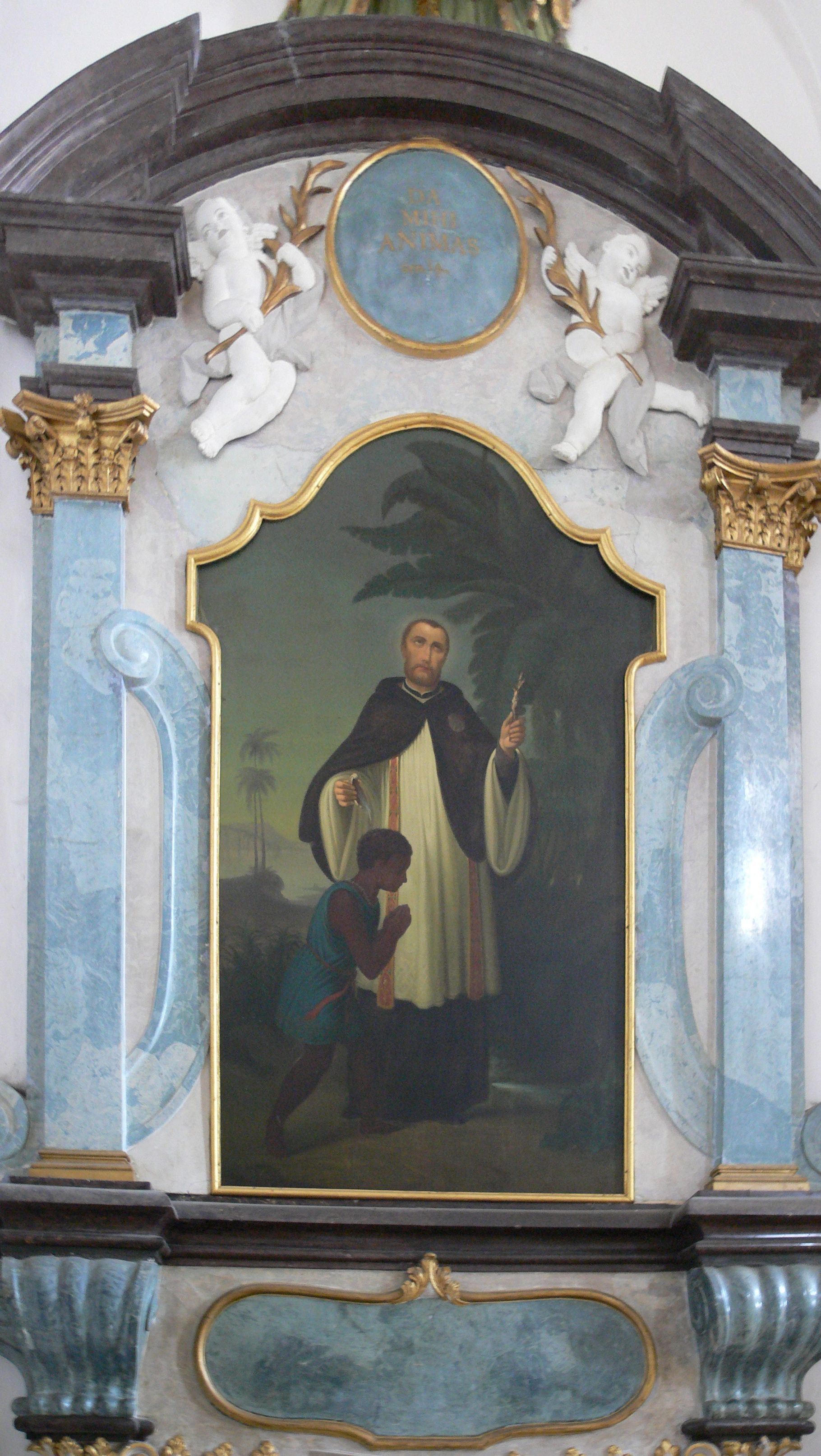 Schönenbergkirche, Ellwangen (Jagst) Franz-Xaver-Altar 1733 von Melchior Paulus; Altarblatt 1866 von Franz Xaver Kolb (Ellwangen)